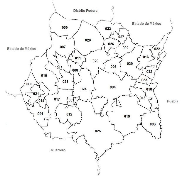 Municipios del Estado de Morelos, México.